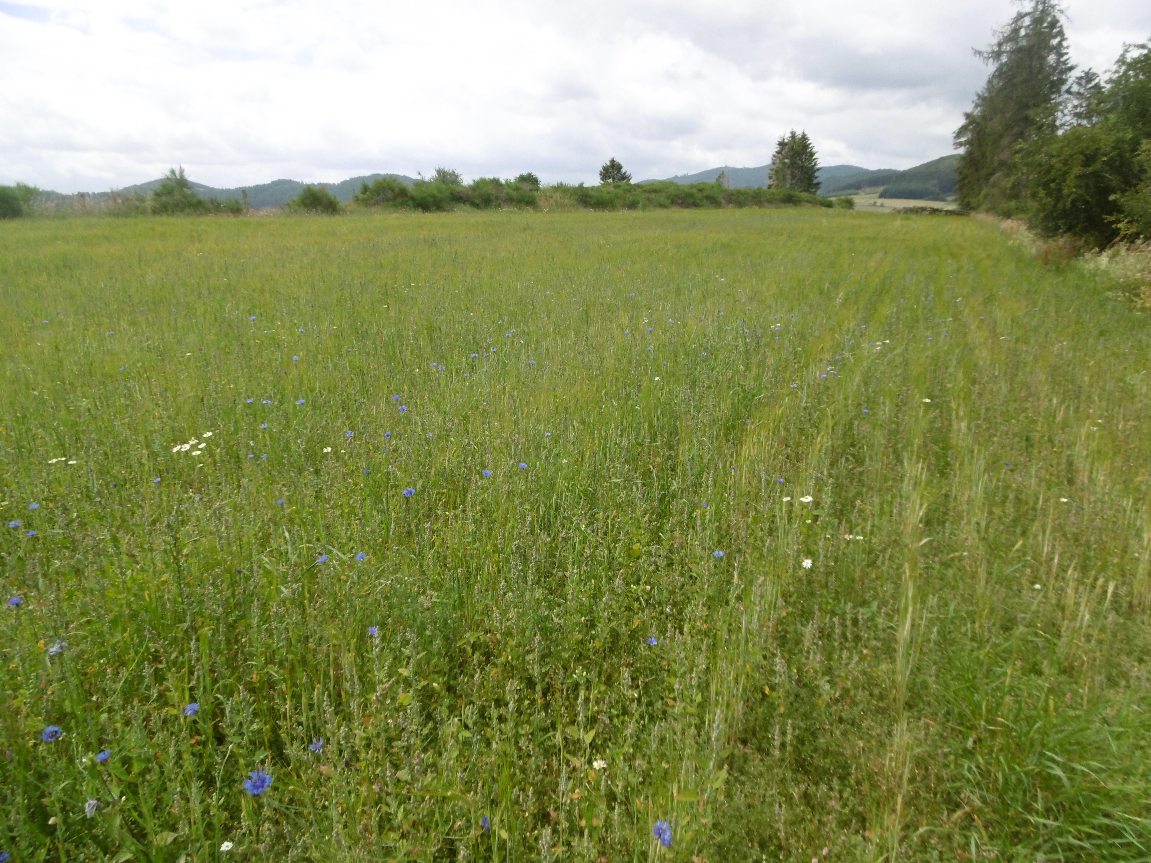 Ackerrandstreifen-Programm-Acker mit Sommergerste auf dem Gelängeberg im Naturschutzgebiet Gelängeberg u.a. mit Kornblume. Am Ackerrandstreifen-Programm können in NRW auch ganze Äcker bis 1,5 ha und in Sonderfällen wie in der Medebacher Bucht auch solche mit bis zu 3 ha Fläche teilnehmen.